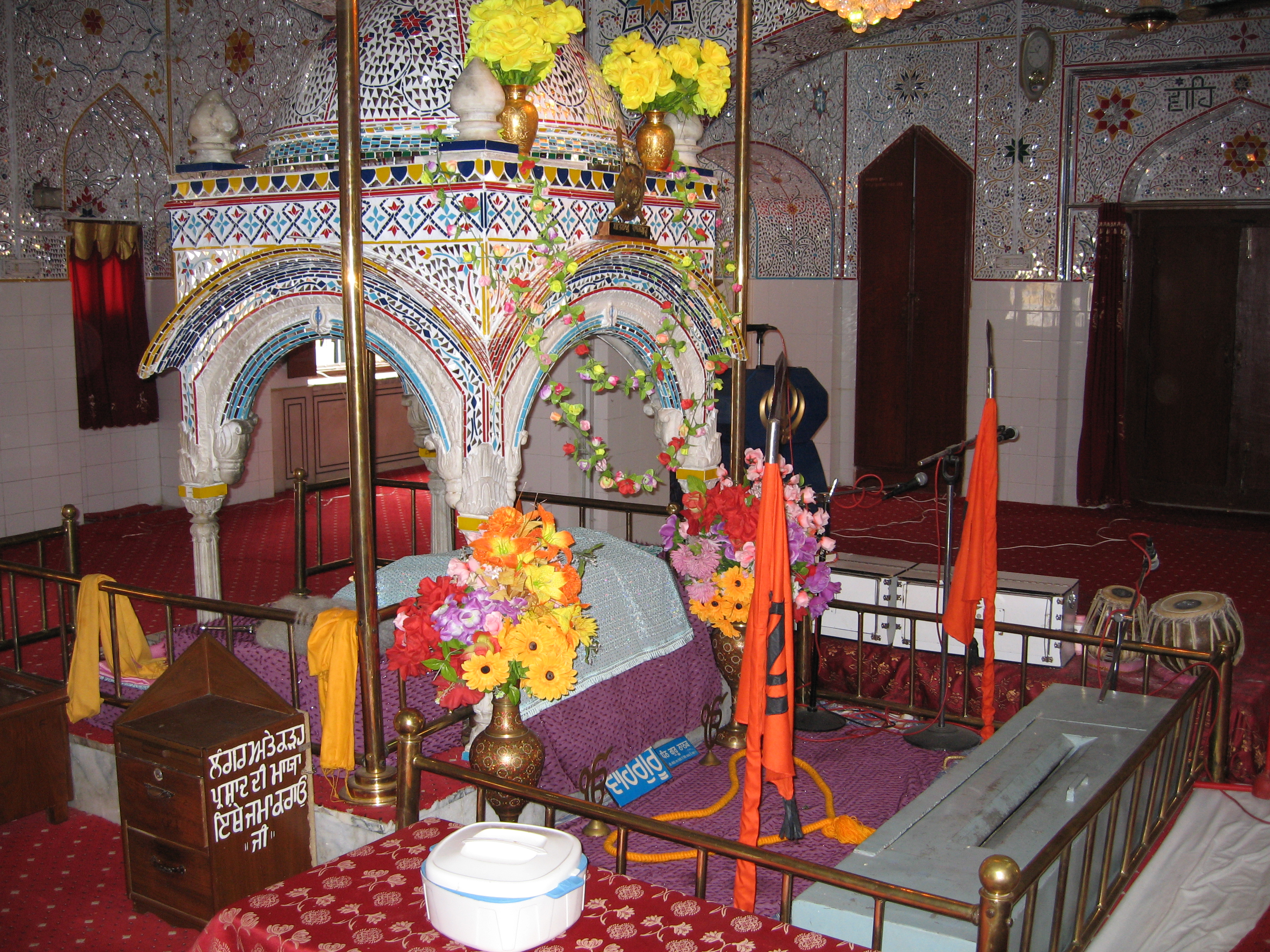 Inside Panja Sahib Gurdwara